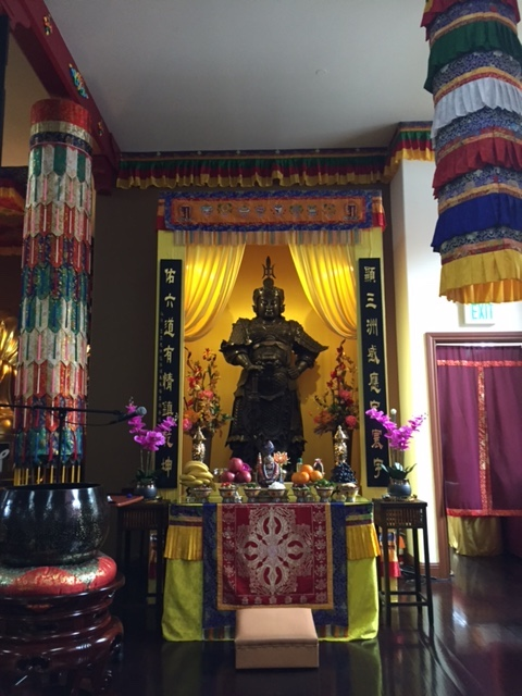 華藏寺韋馱菩薩法像